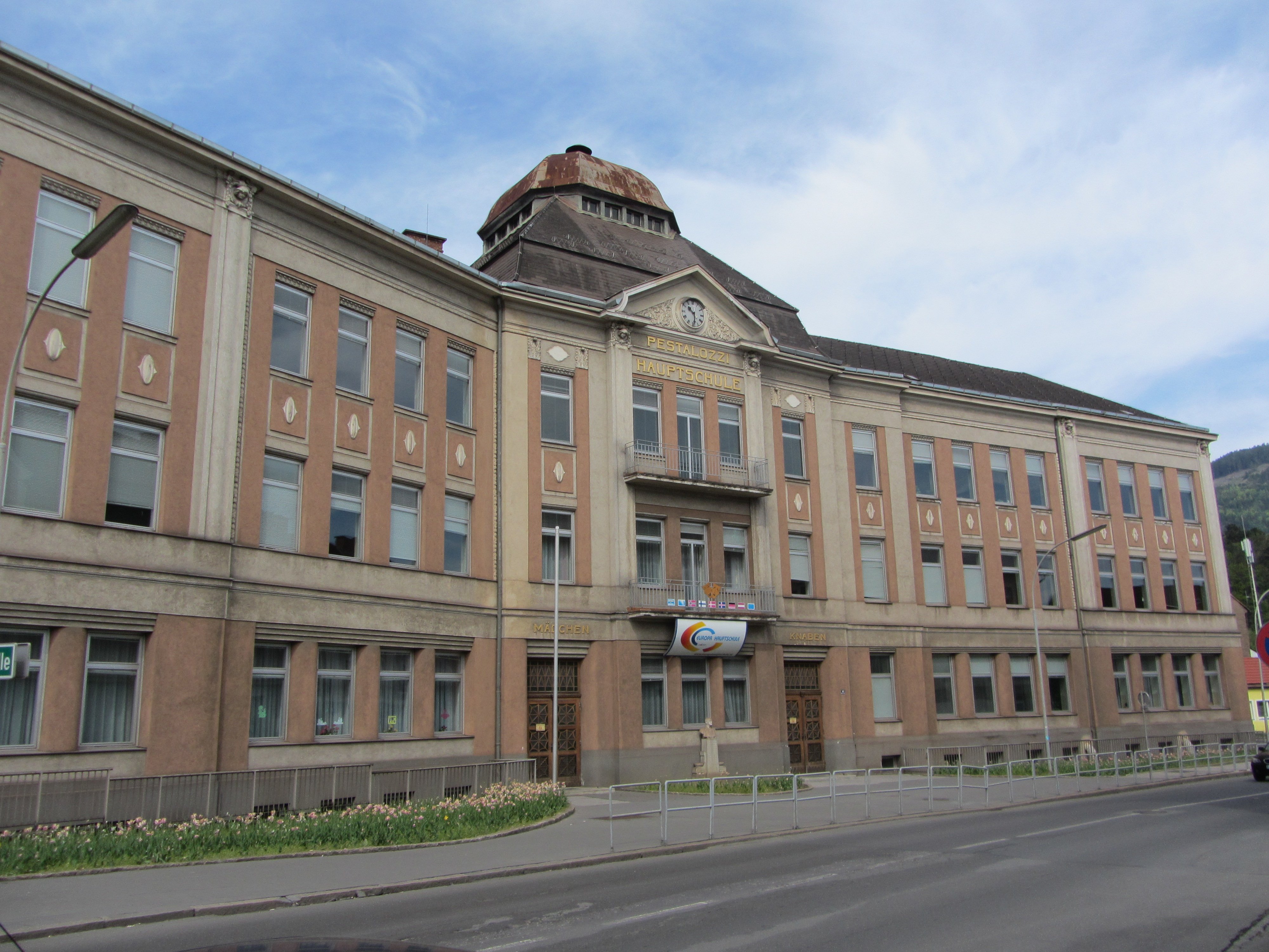 Pestalozzischule Leoben